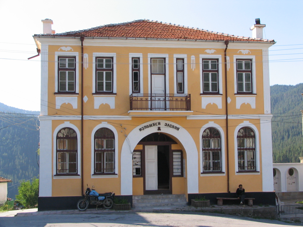 изложбен заслон в Славейно